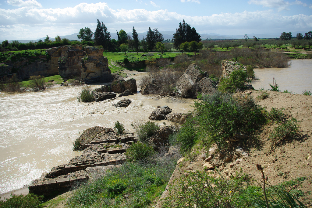 Römische Brücke über die Medjerda in Chimtou, Tunesien